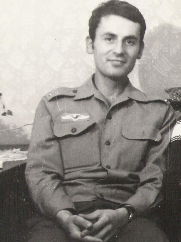 Vojtěch Cikrle během vojenské služby